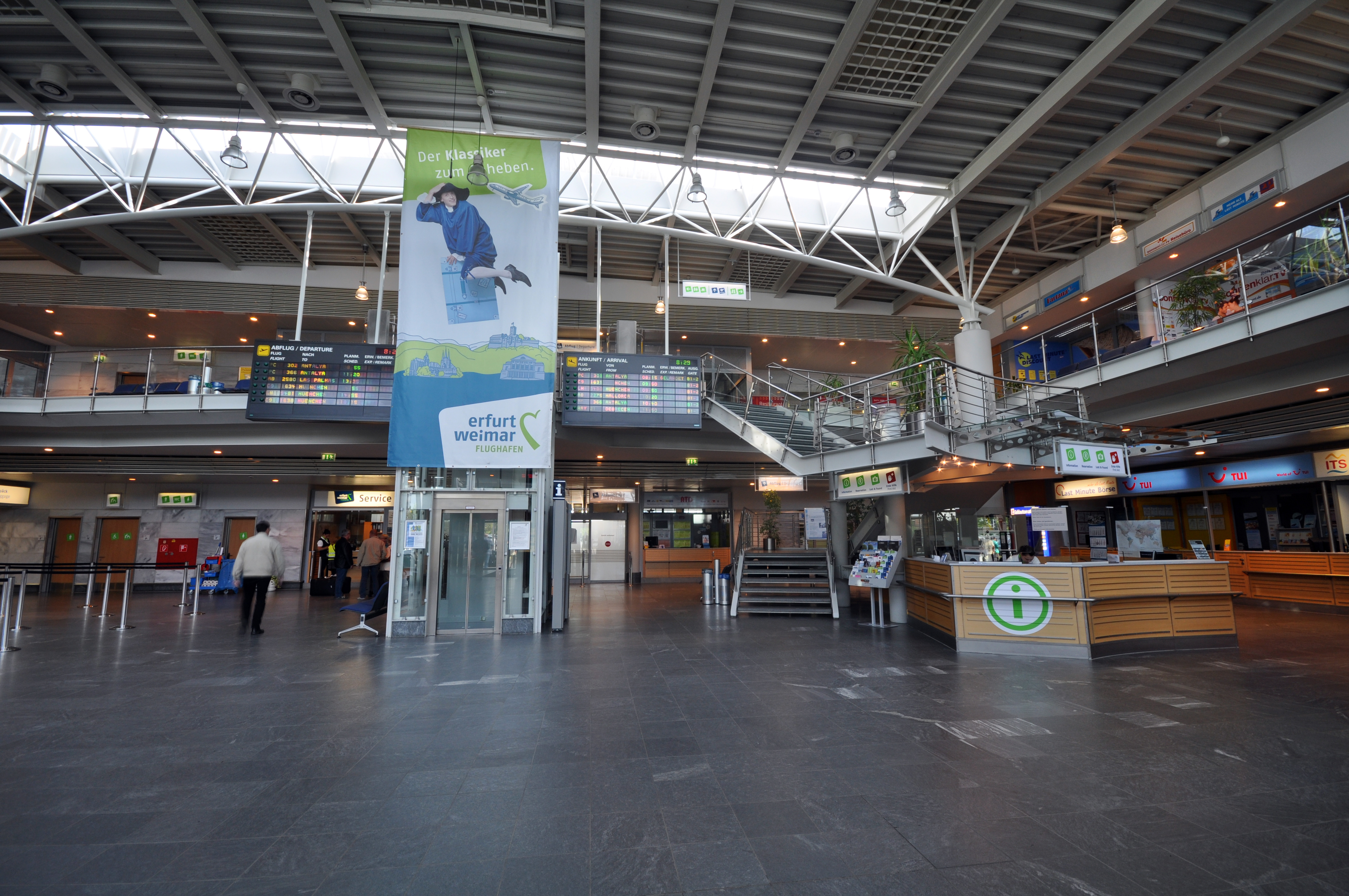 Flughafen Erfurt-Weimar